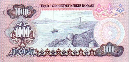 E6 serisi 1.000 TL'nin arka yüzü